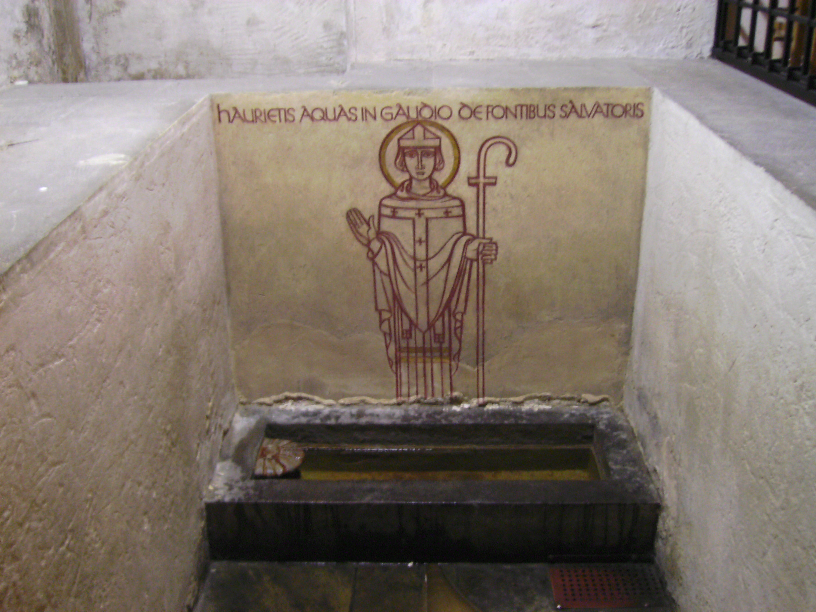 Echternach: Willibrord-Quelle in der Kryptaa der Klosterkirche